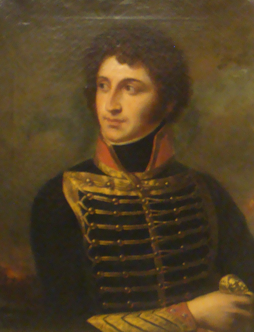 Général Jean-François Joseph Debelle (1767-1802)